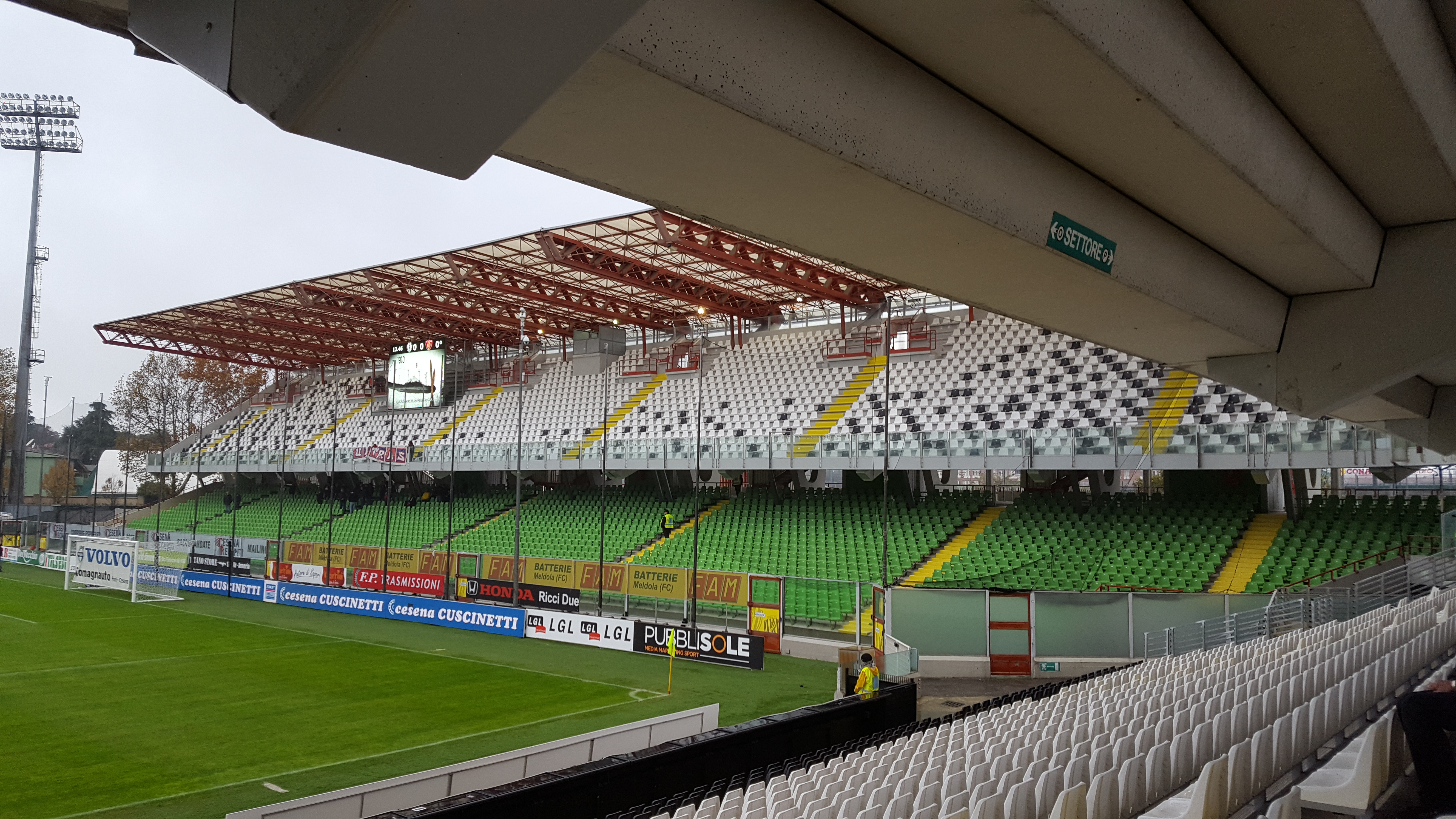 Come appare oggi la curva ferrovia (ospiti), in seguito ai lavori dell'estate 2018.